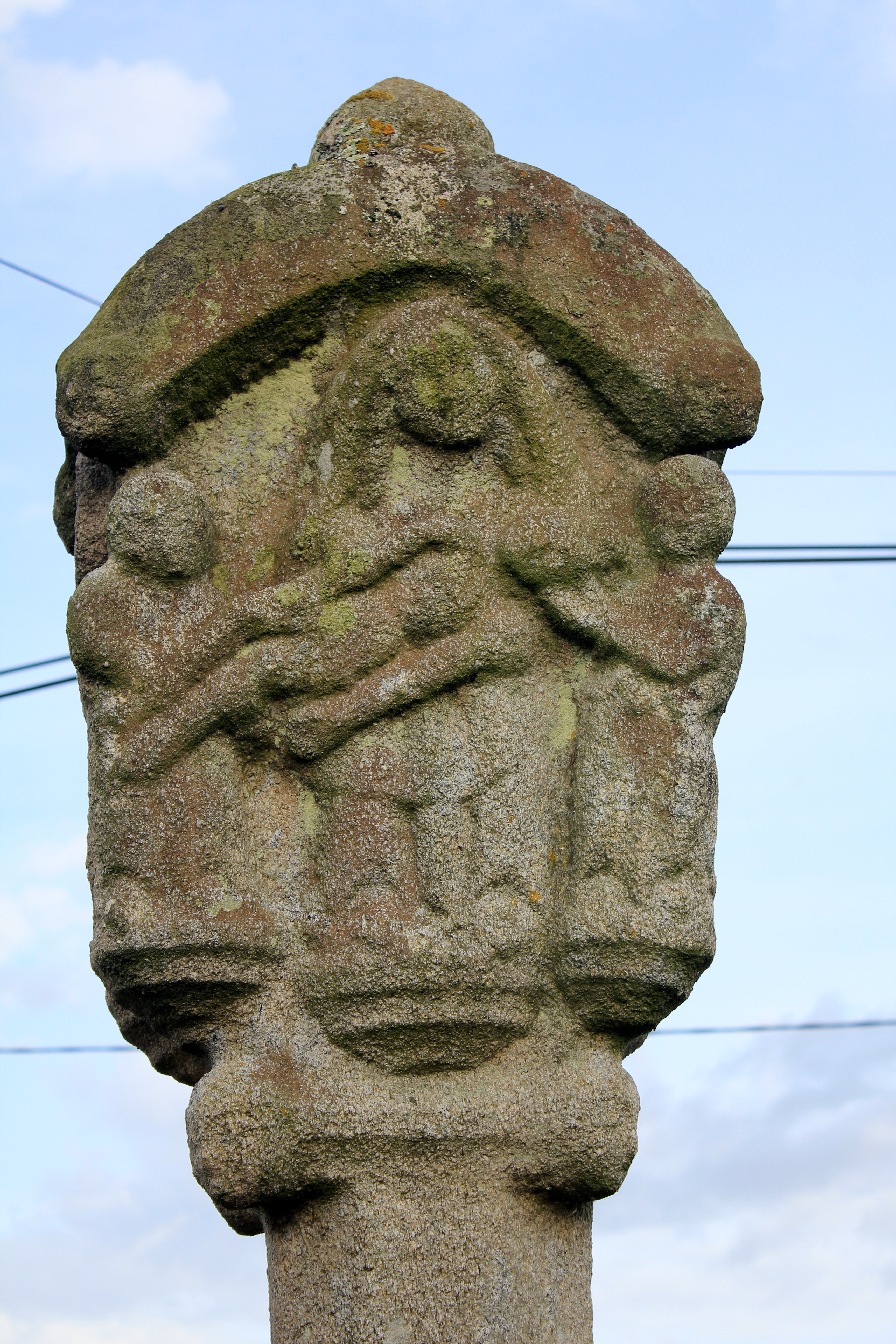 Croix de Penlan : détail piéta